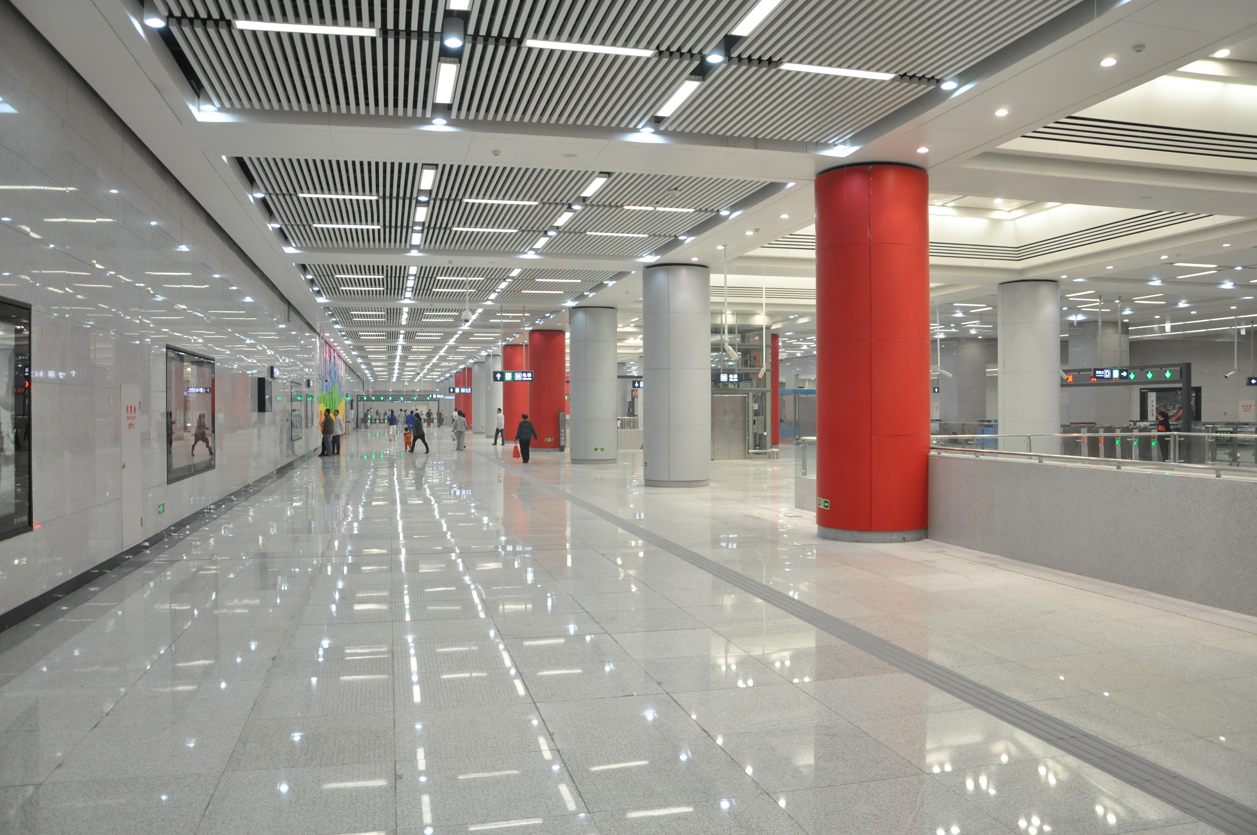 北京地铁10号线丰台站站厅